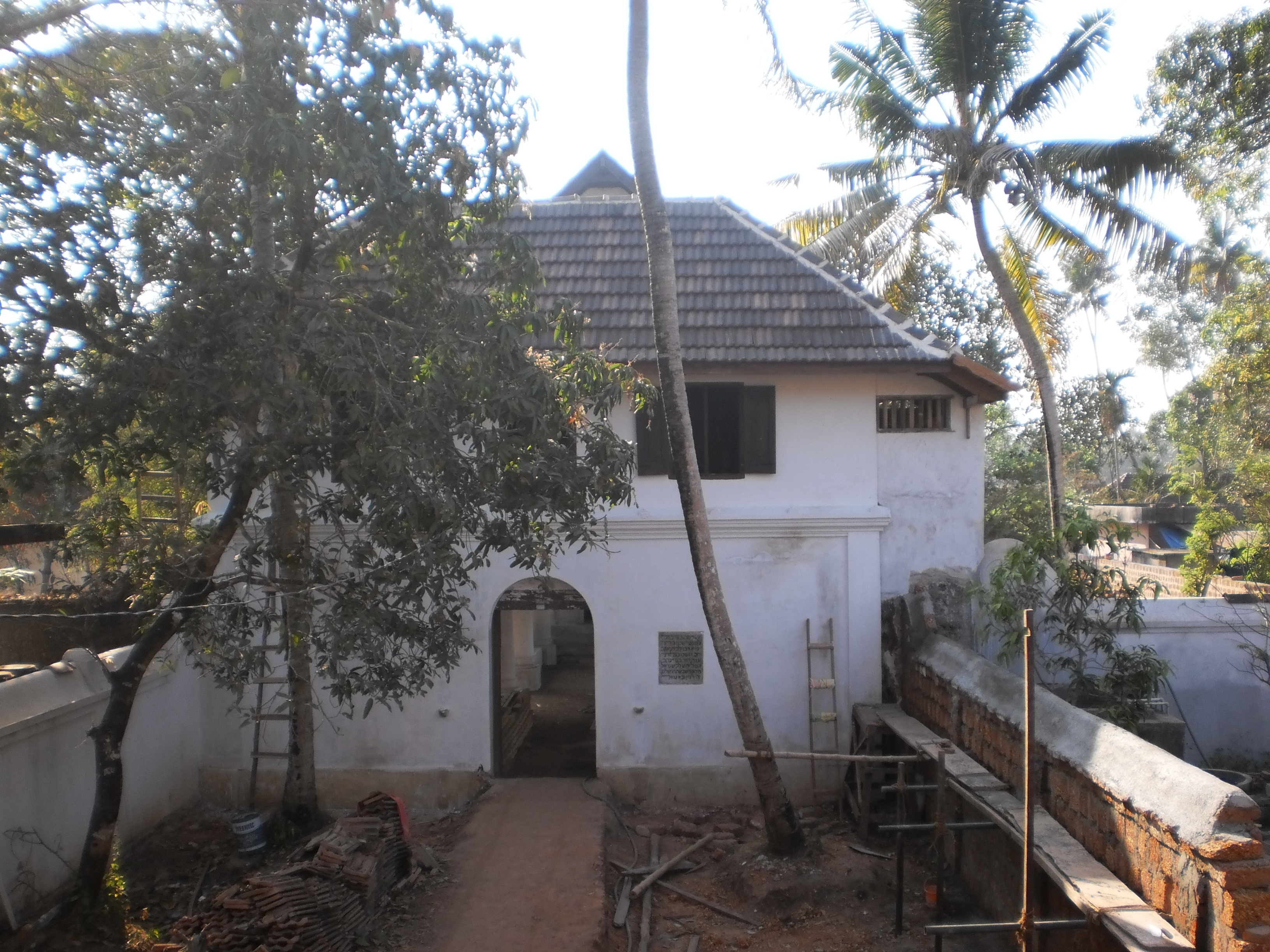 പറവൂര്‍ ജുതപ്പള്ളി മുസിരിസ് പൈതൃകപദ്ധതിയുടെ ഭാഗമായി പുതുക്കിപ്പണിയുന്നു. പള്ളിയിലേക്കുള്ള ഇടനാഴി